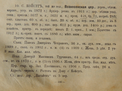 Справочная книга Екатеринославской Епархии - 1913 год (сведения о Вознесенской церкви в Койсуге, ныне Батайск).